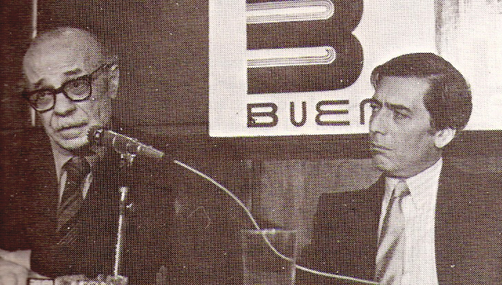 Ernesto Sábato, escritor argentino junto a Mario Vargas Llosa, escritor peruano